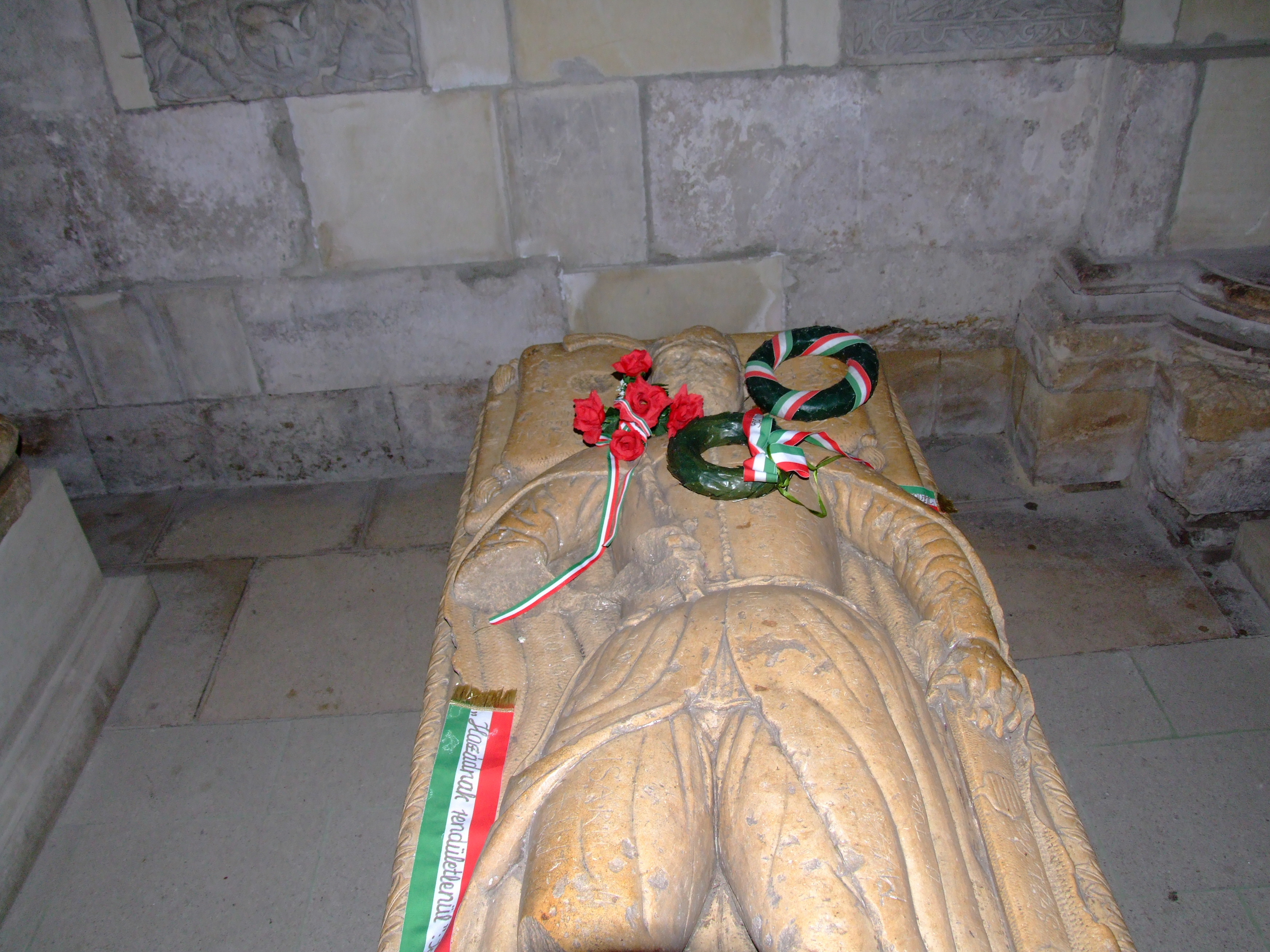 2006 0602IancuDeHunedoara0409